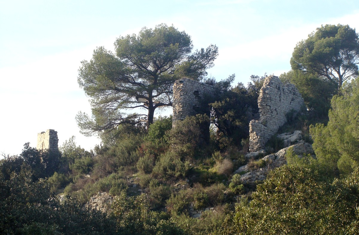 Ruines du Château de Ners. On distingue nettement les deux murailles.